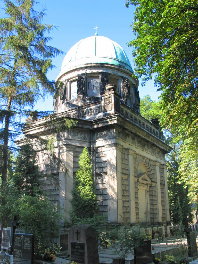 Grobowiec Juliusza Heinzla Łódź